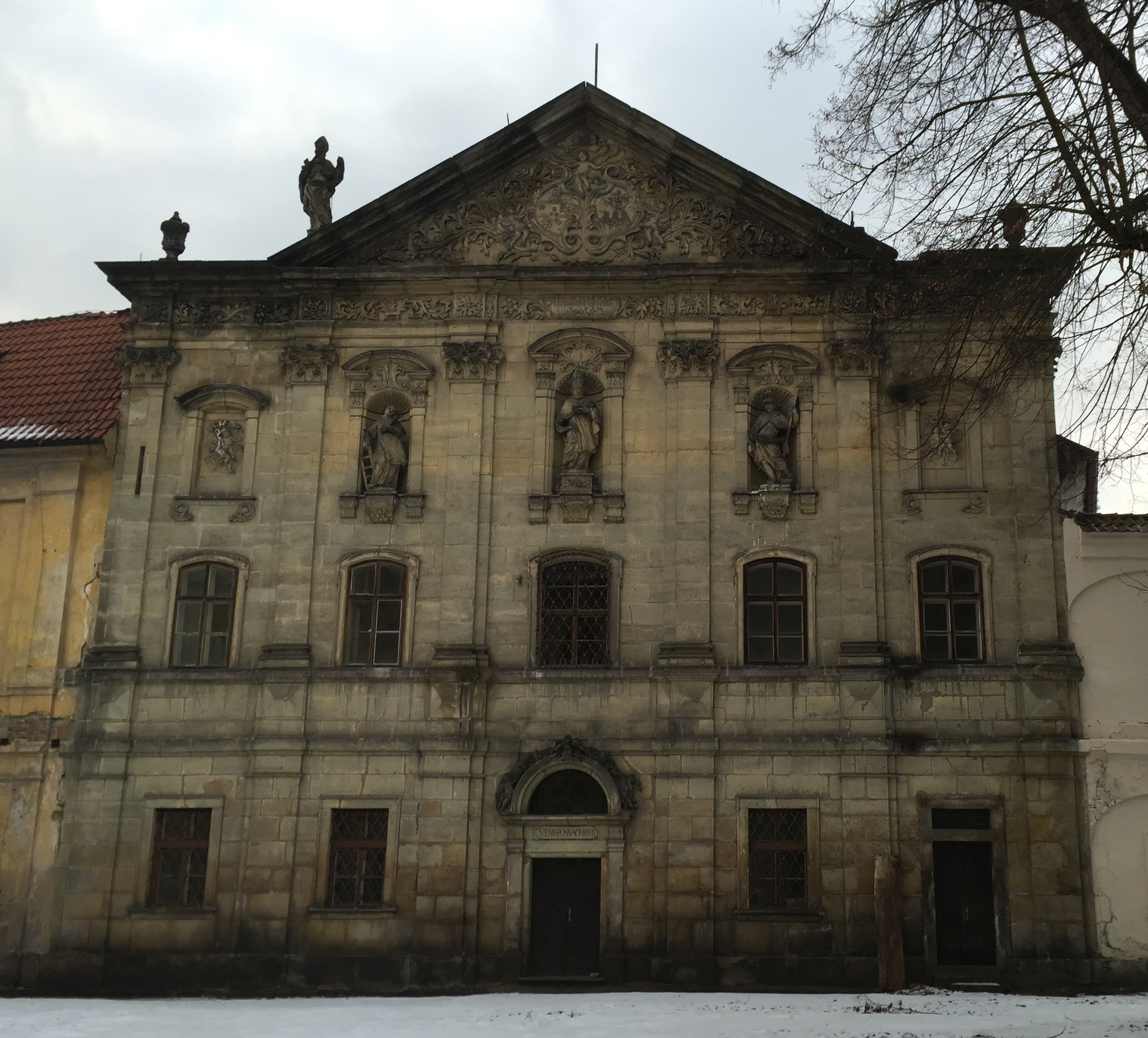 Klášter Doksany, budova konventu